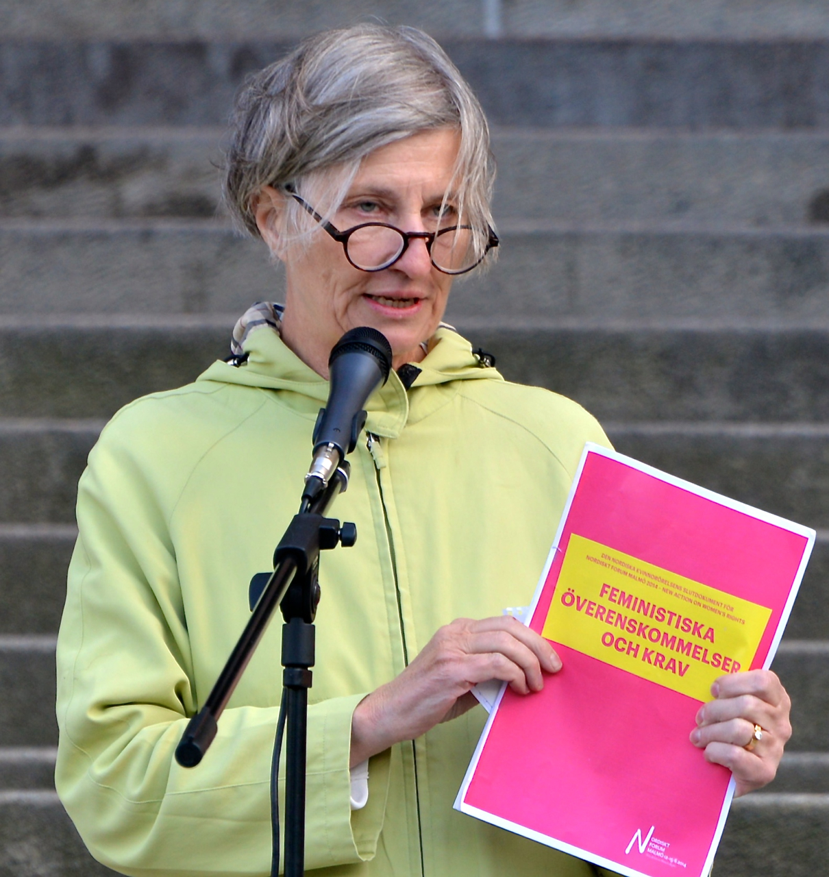 GAPF-manifestation på Medborgarplatsen i Stockholm den 24 juni 2014.